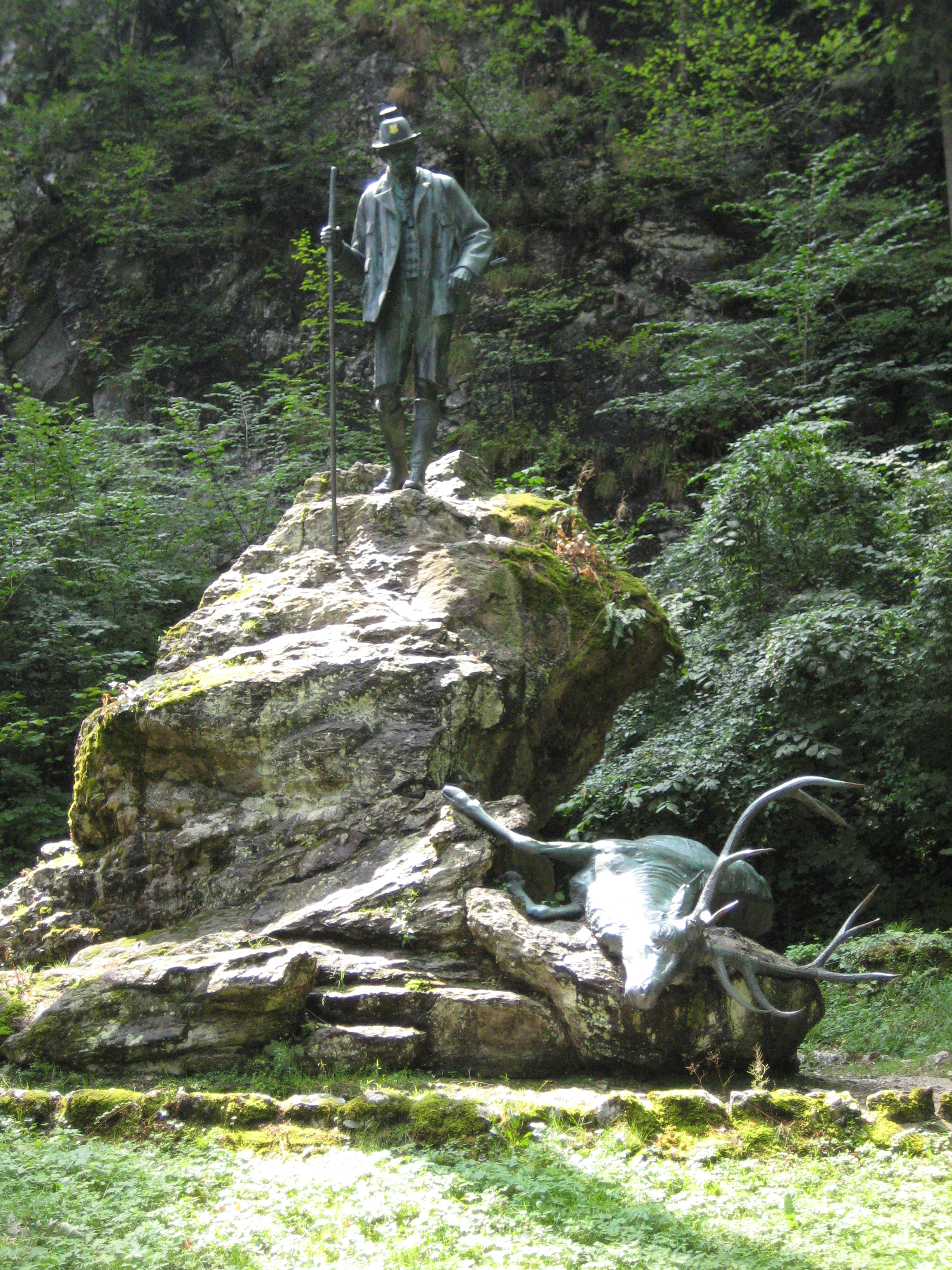 Figurenbildstock, Kaiser - Jagdstandbild